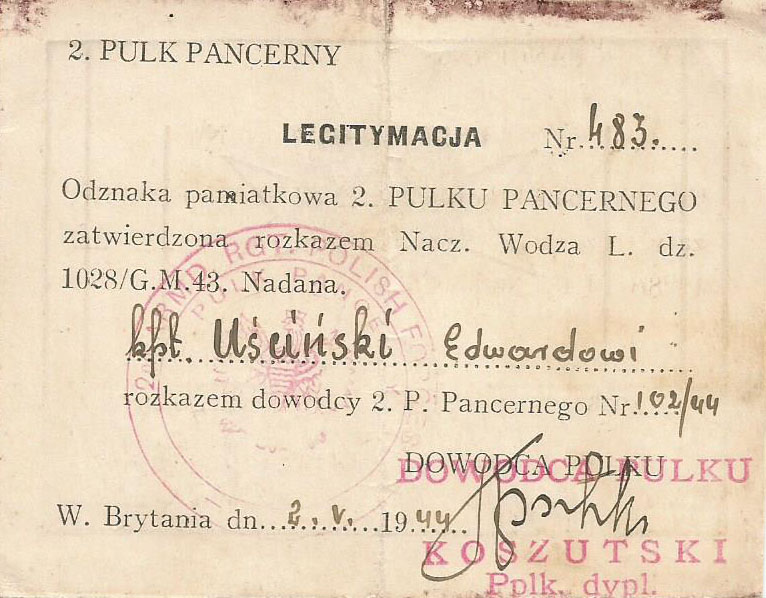 Odznaka Pamiątkowa 2 Pułku Pancernego - Edward Uściński